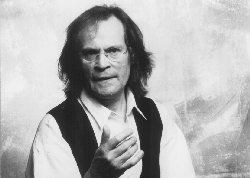 Foto des Dirigenten Joachim Carlos Martini